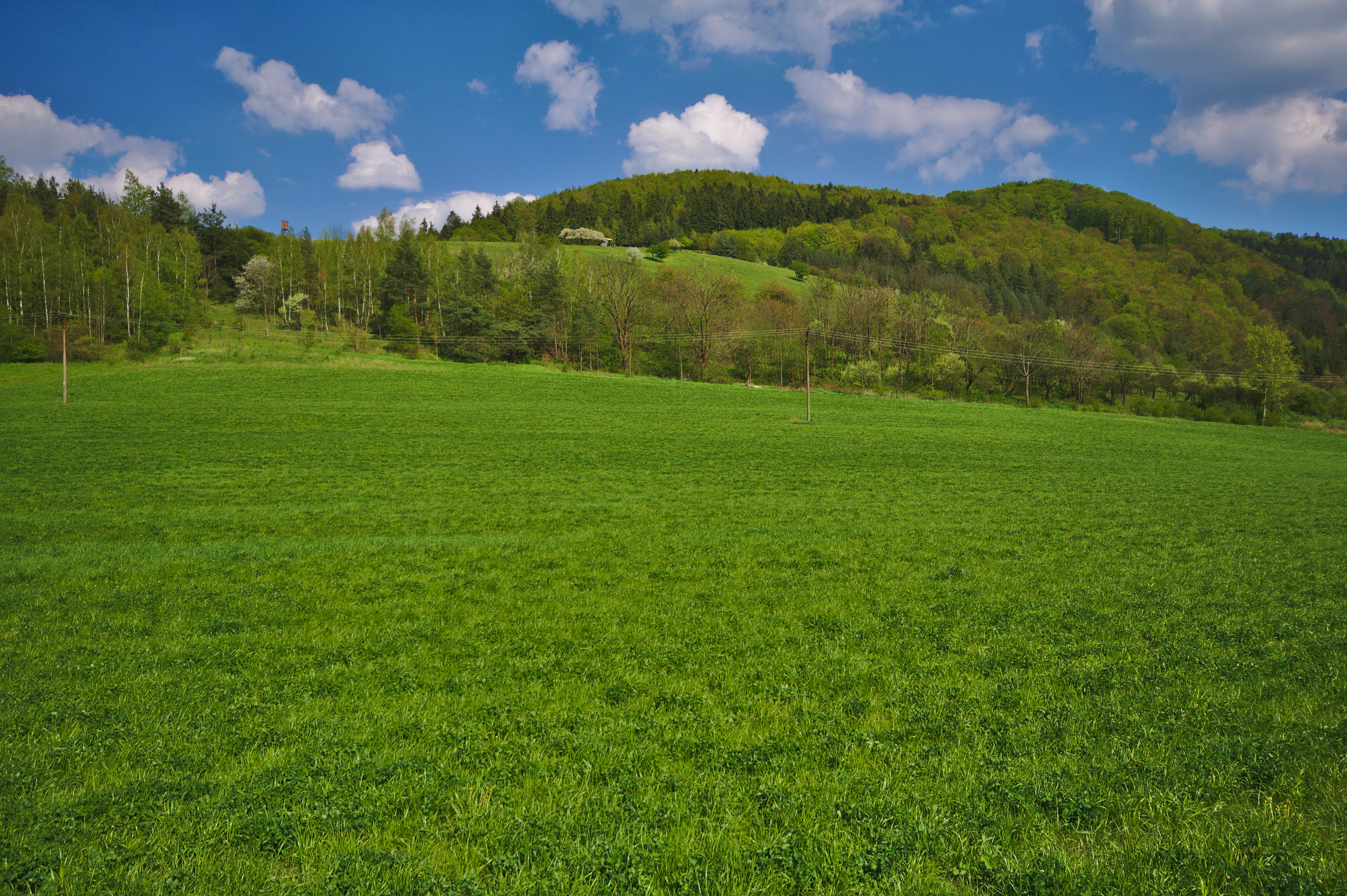 Přírodní památka U Hamrů, okres Žďár nad Sázavou